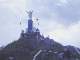 cristo del picacho medellin